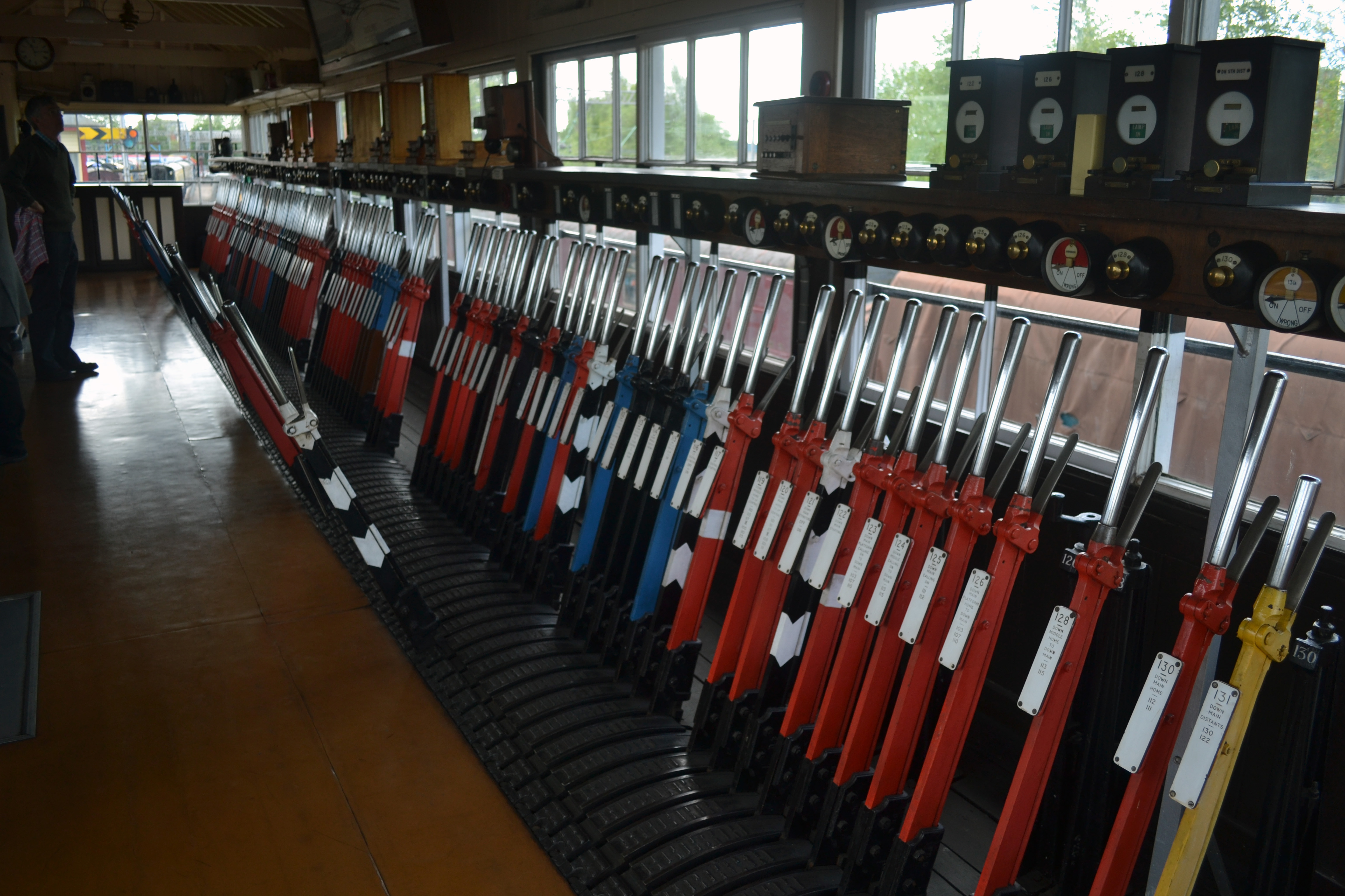 Crewe Heritage Centre